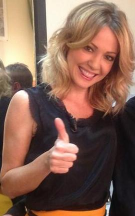 Georgia Luzi